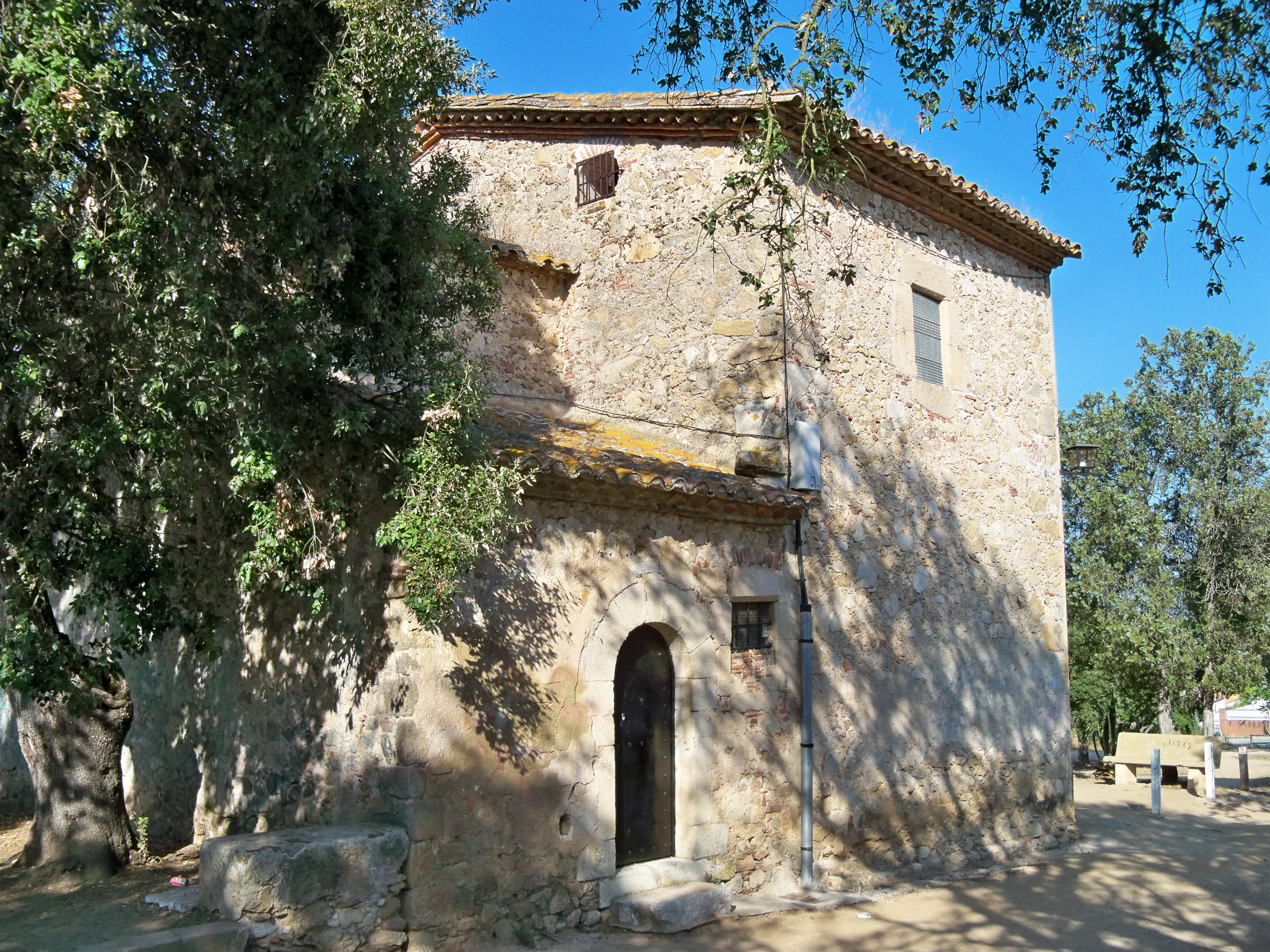 Kaplica św. Quiricusa w Lloret de Mar